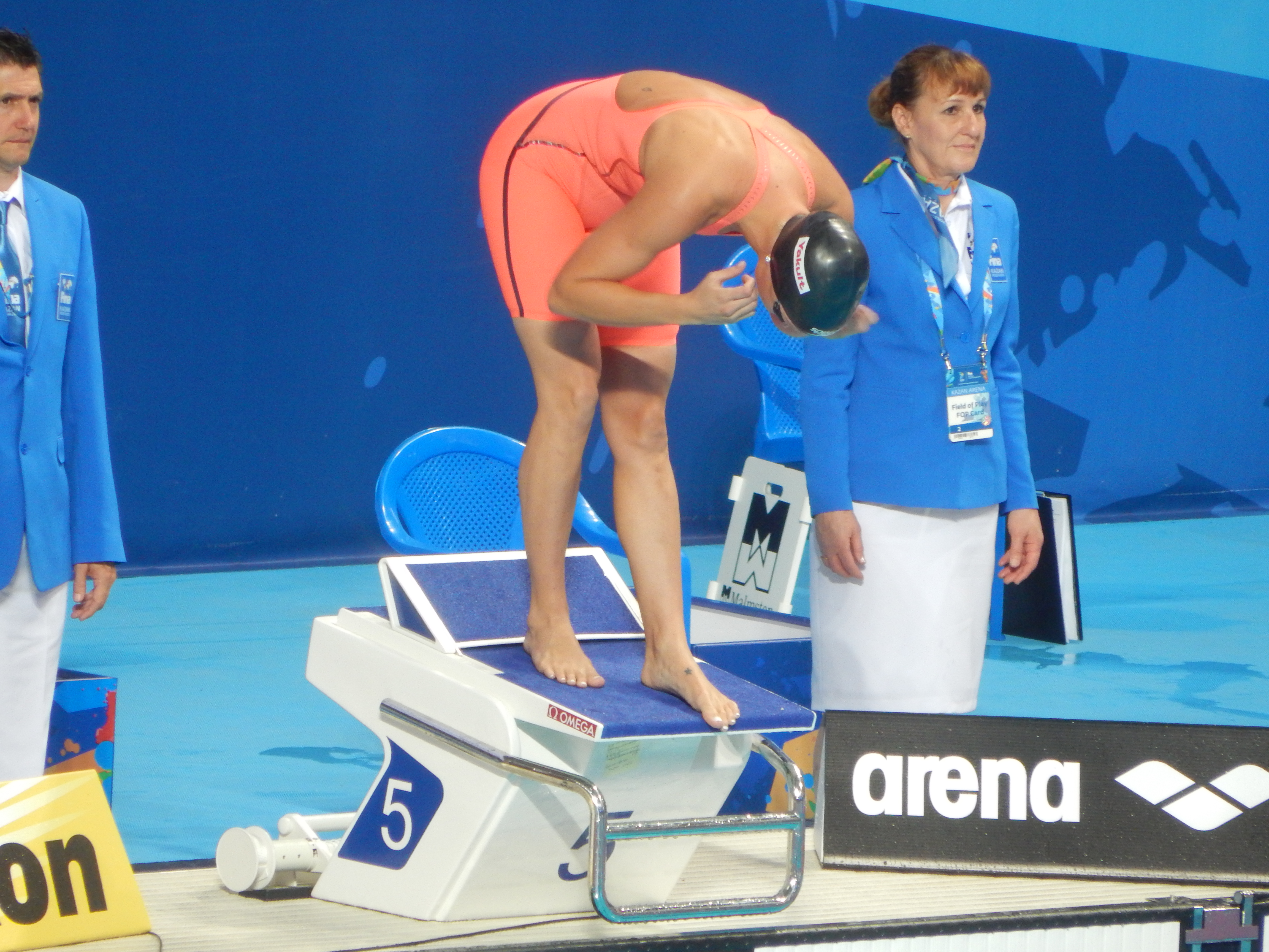 Джессика Харди на чемпионате мира в Казани